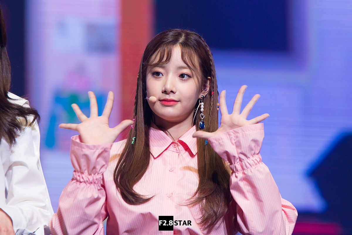 20180303 이현주 유니티 팬미팅